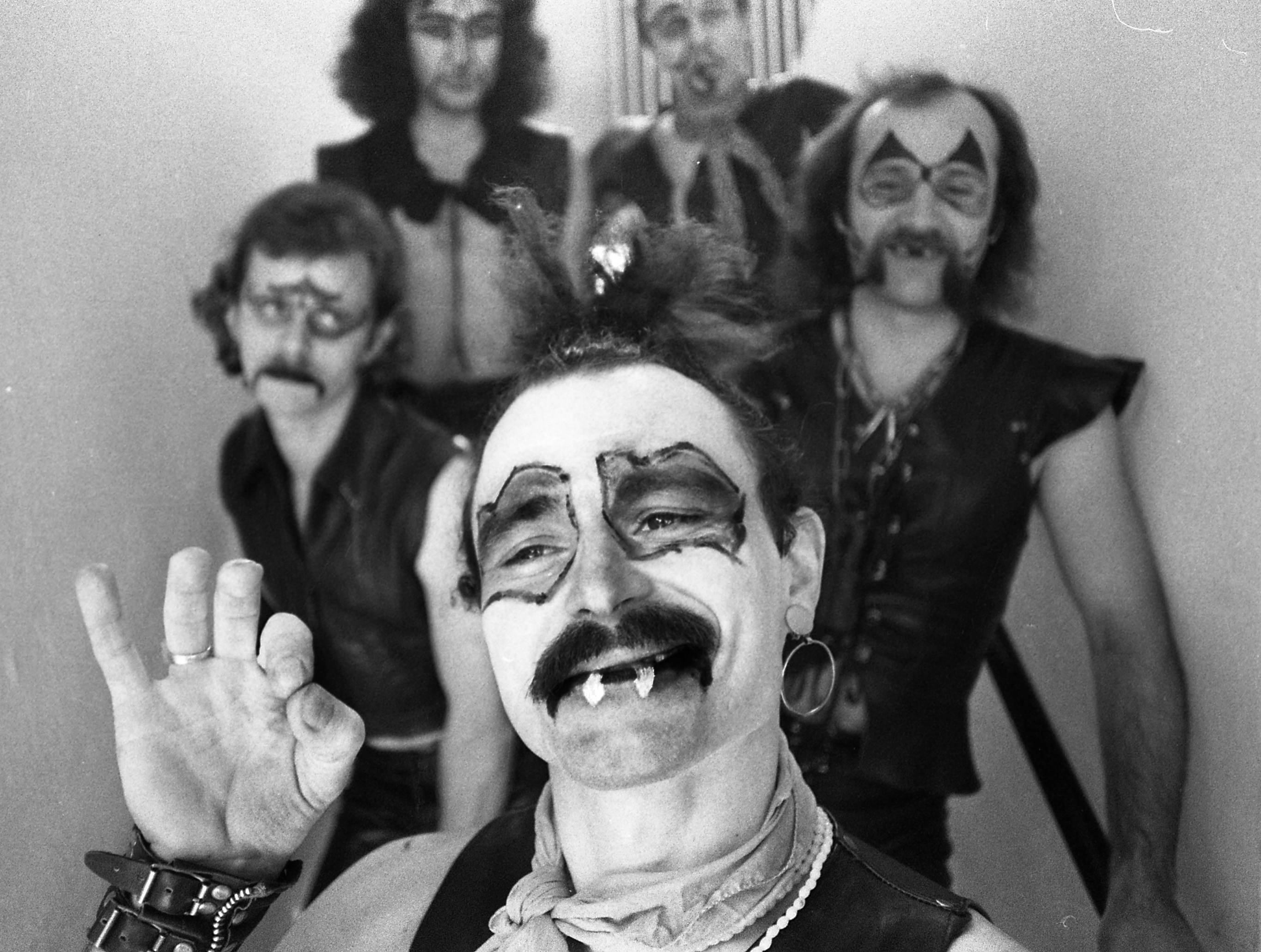 Beatrice együttes tagjai: hátul Donászy Tibor, Miklóska Lajos, középen Lugosi László, Gidófalvy Attila, elől Nagy Feró. Location: Hungary Tags: Beatrice-portrayal Title: Beatrice együttes tagjai: hátul Donászy Tibor, Miklóska Lajos, középen Lugosi László, Gidófalvy Attila, elől Nagy Feró.